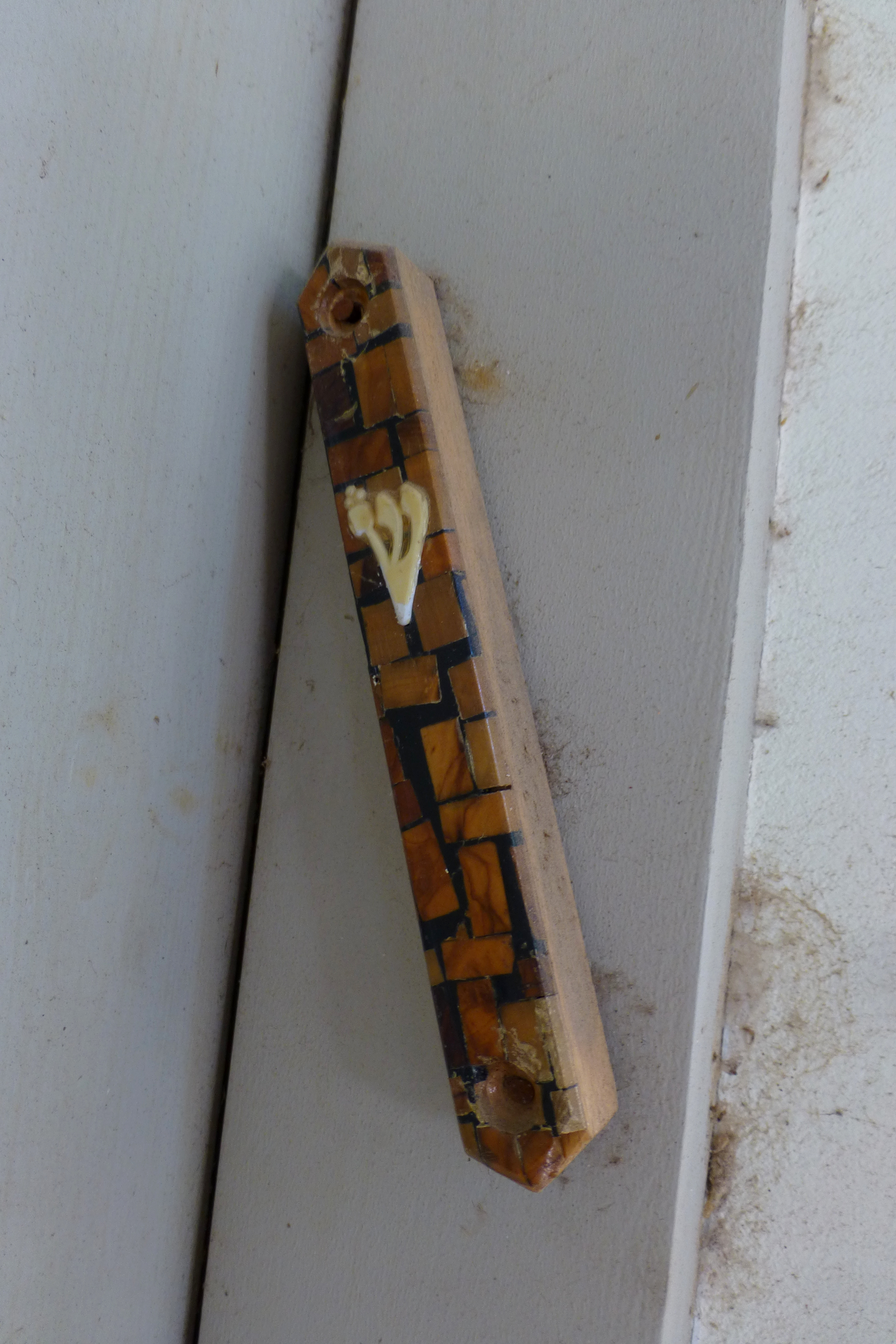 רח' מונטיפיורי 3, פתח תקווה